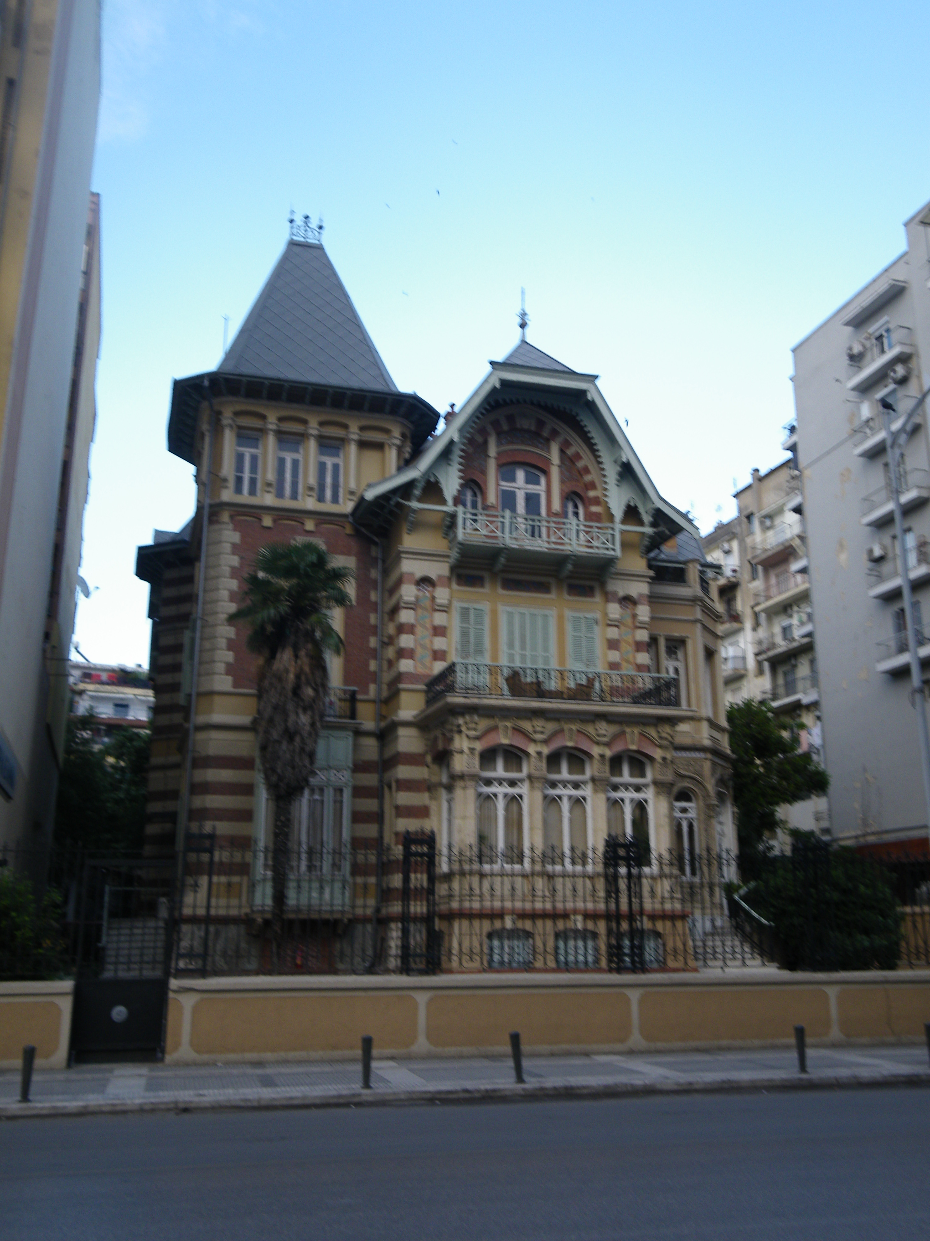 Βίλα Αχμέτ Καπατζή